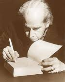 Luis Cardoza y Aragón